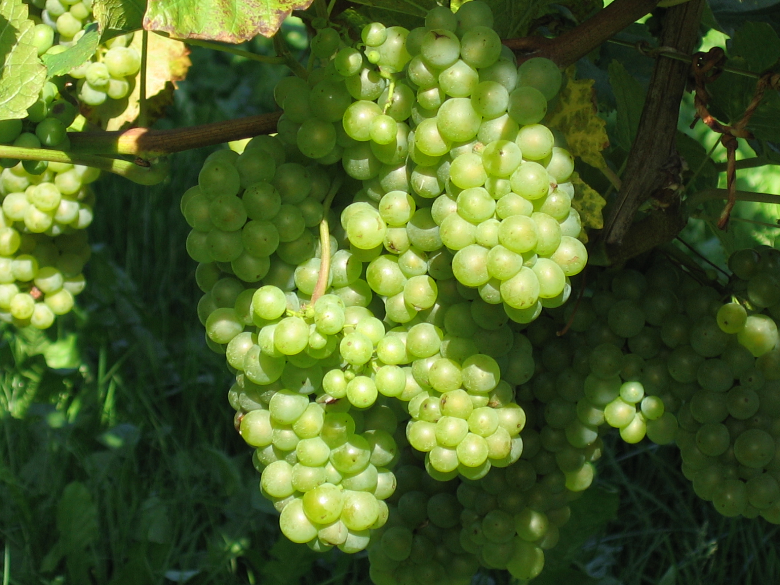 Traube des weißen Burgunders